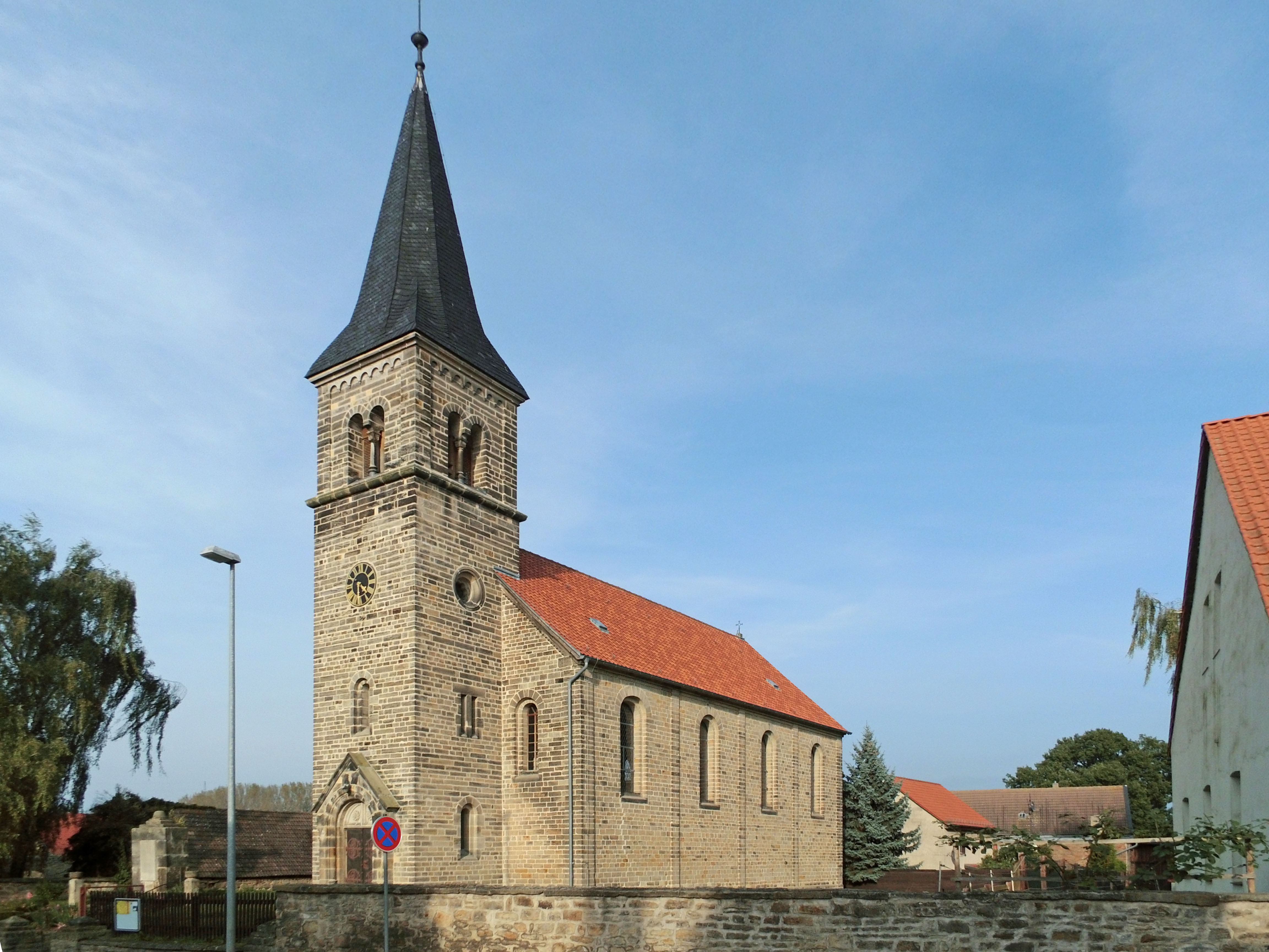 Kirche in belsdorf